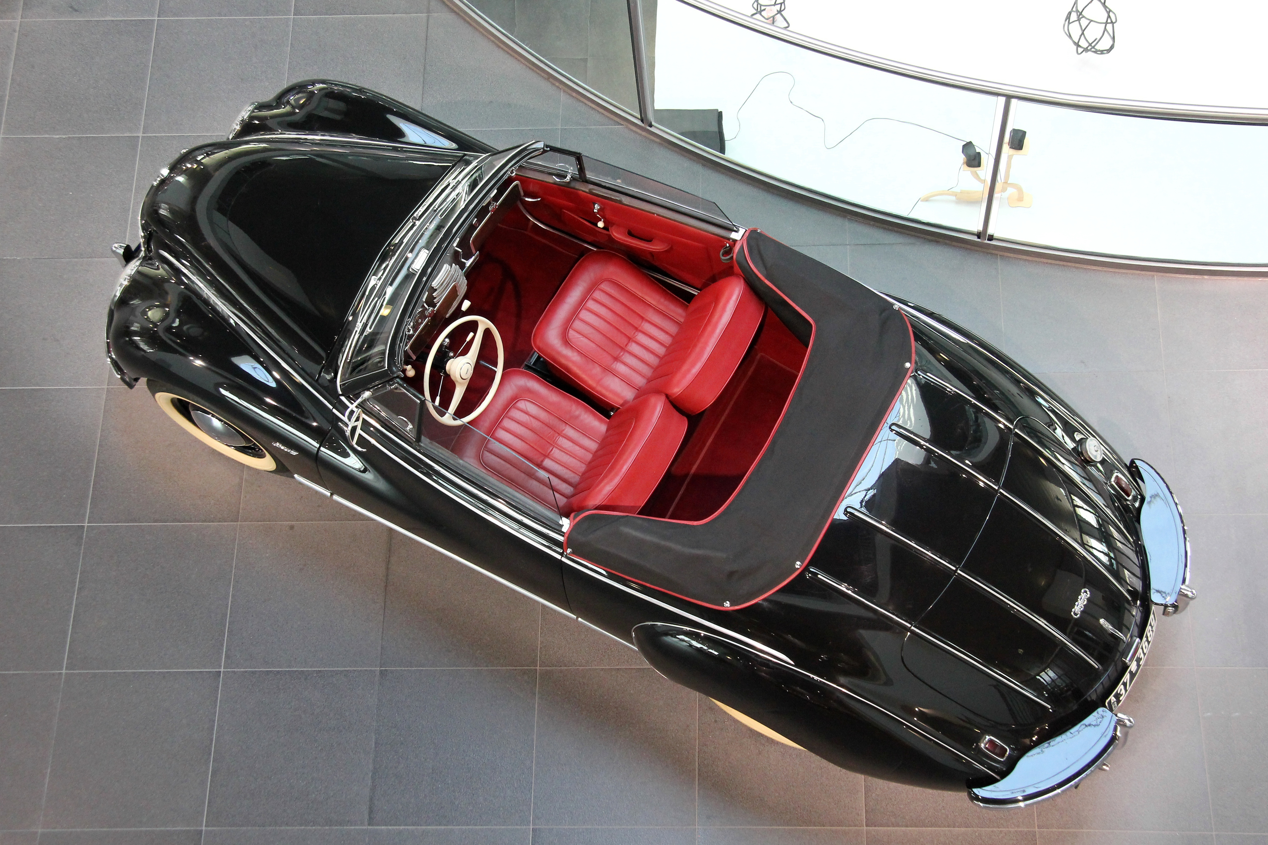 DKW Sonderklasse, Typ F 91, Cabriolet von Karmann, Baujahr 1953, im museum mobile in Ingolstadt. 3-Zylinder-Zweitaktmotor, 896 cm³, 34 PS bei 4000/min, Höchstgeschwindigkeit 115 km/h, Verbrauch: 9 l/100 km. 432 Stück wurden gebaut.